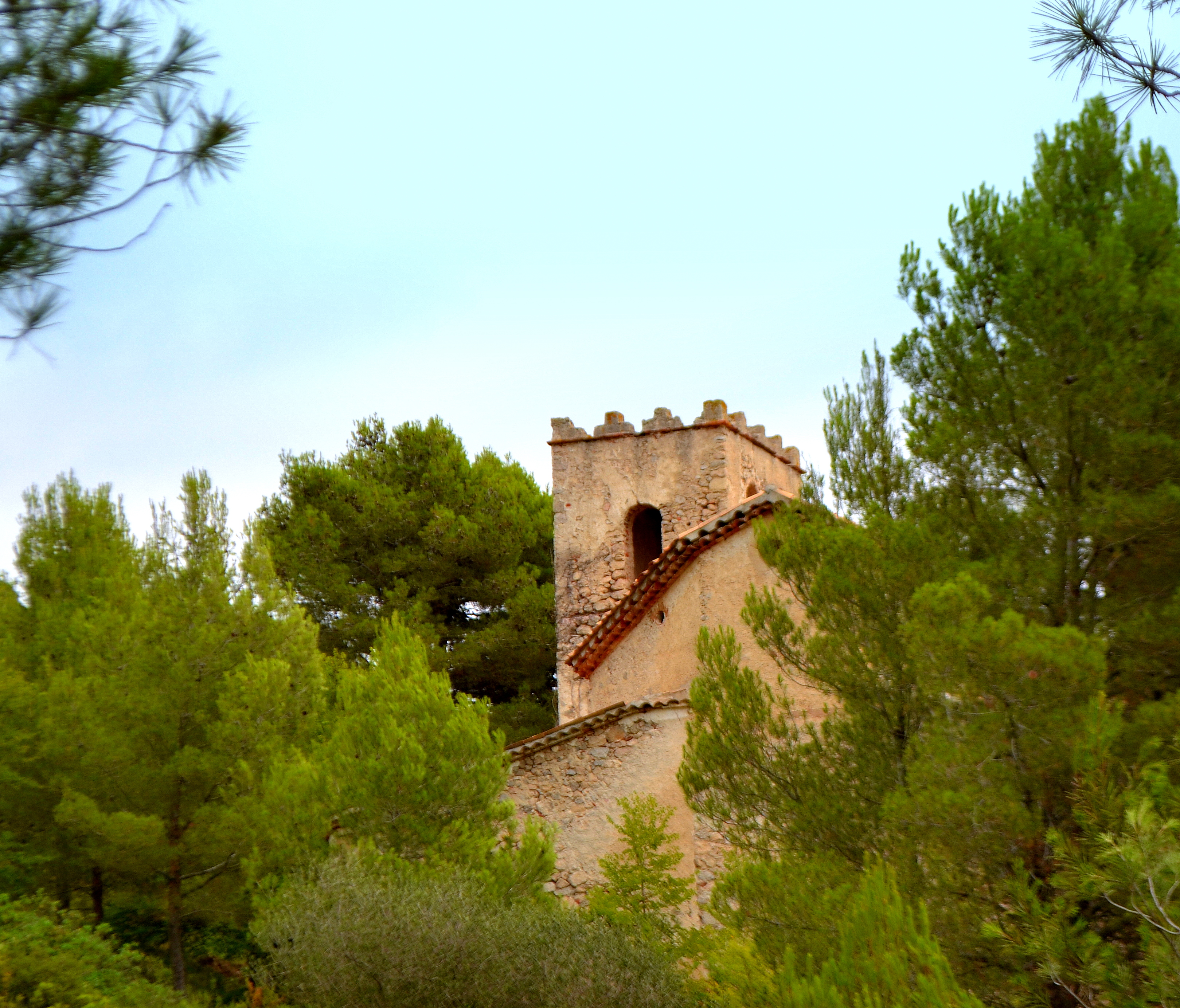 Església nova de Sant Miquel (el Montmell)